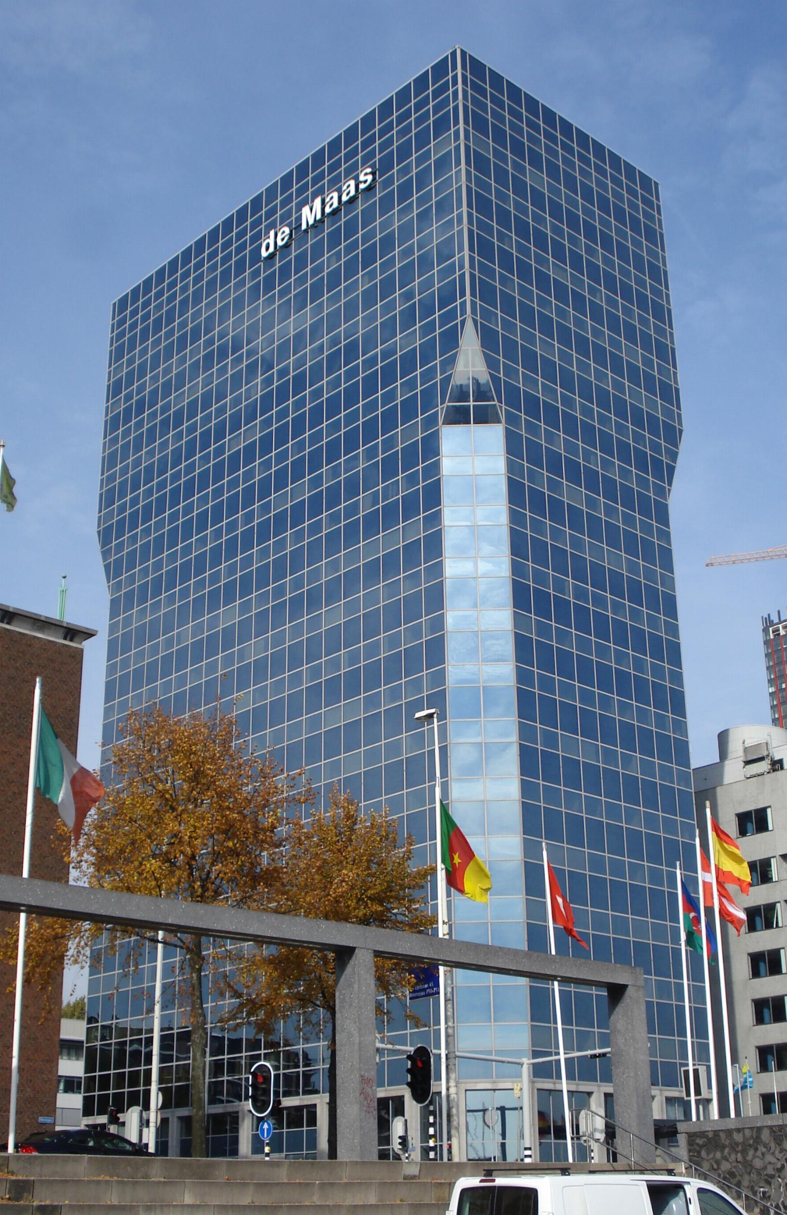 Rotterdam, Boompjes. Gebouw "De Maas", Rijkswaterstaat.